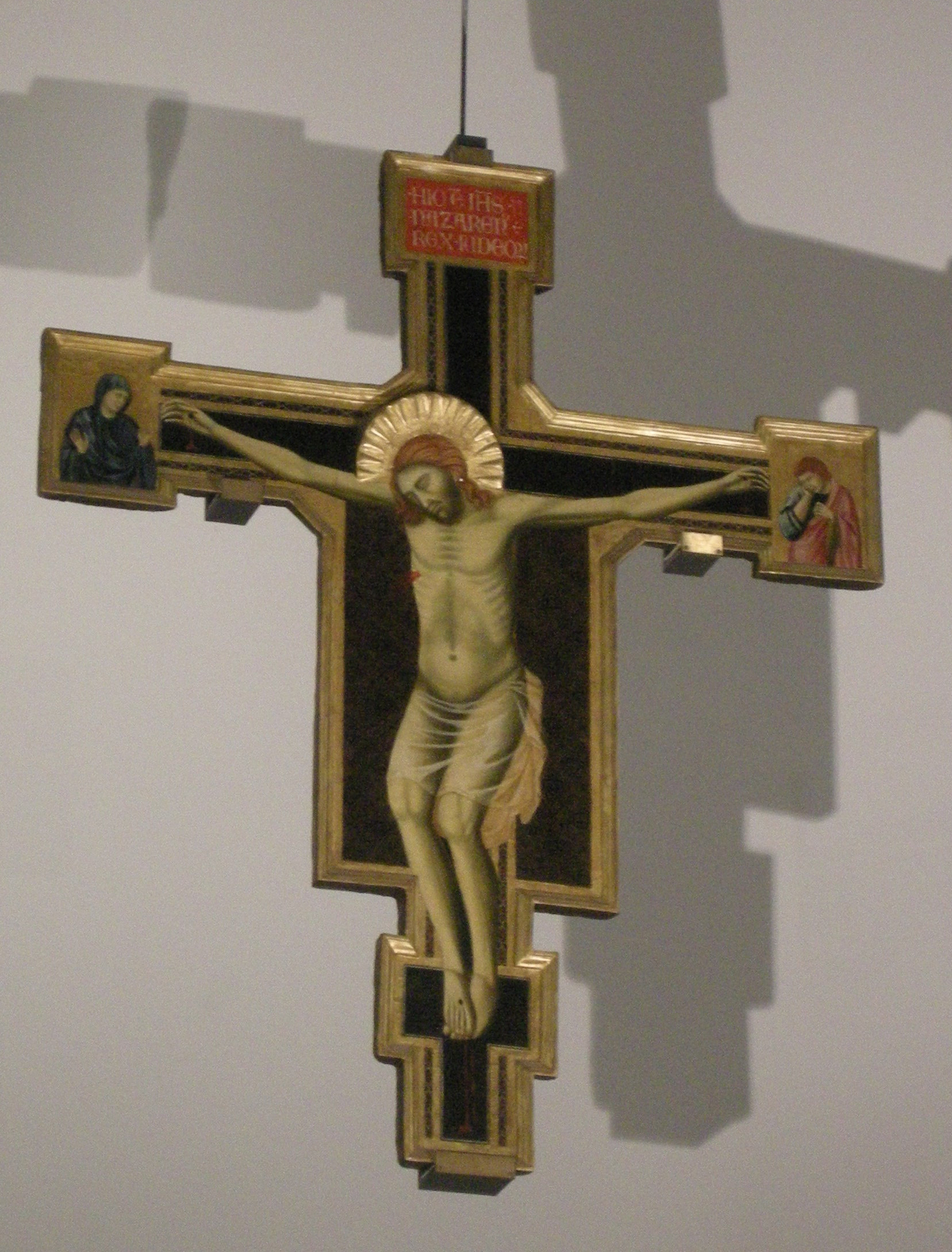 Santo stefano in pane, crocifisso della scuola di Giotto